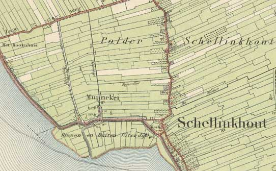 De polder Buiten- en Binnen-Uiterdijk op een kadasterkaart uit 1903